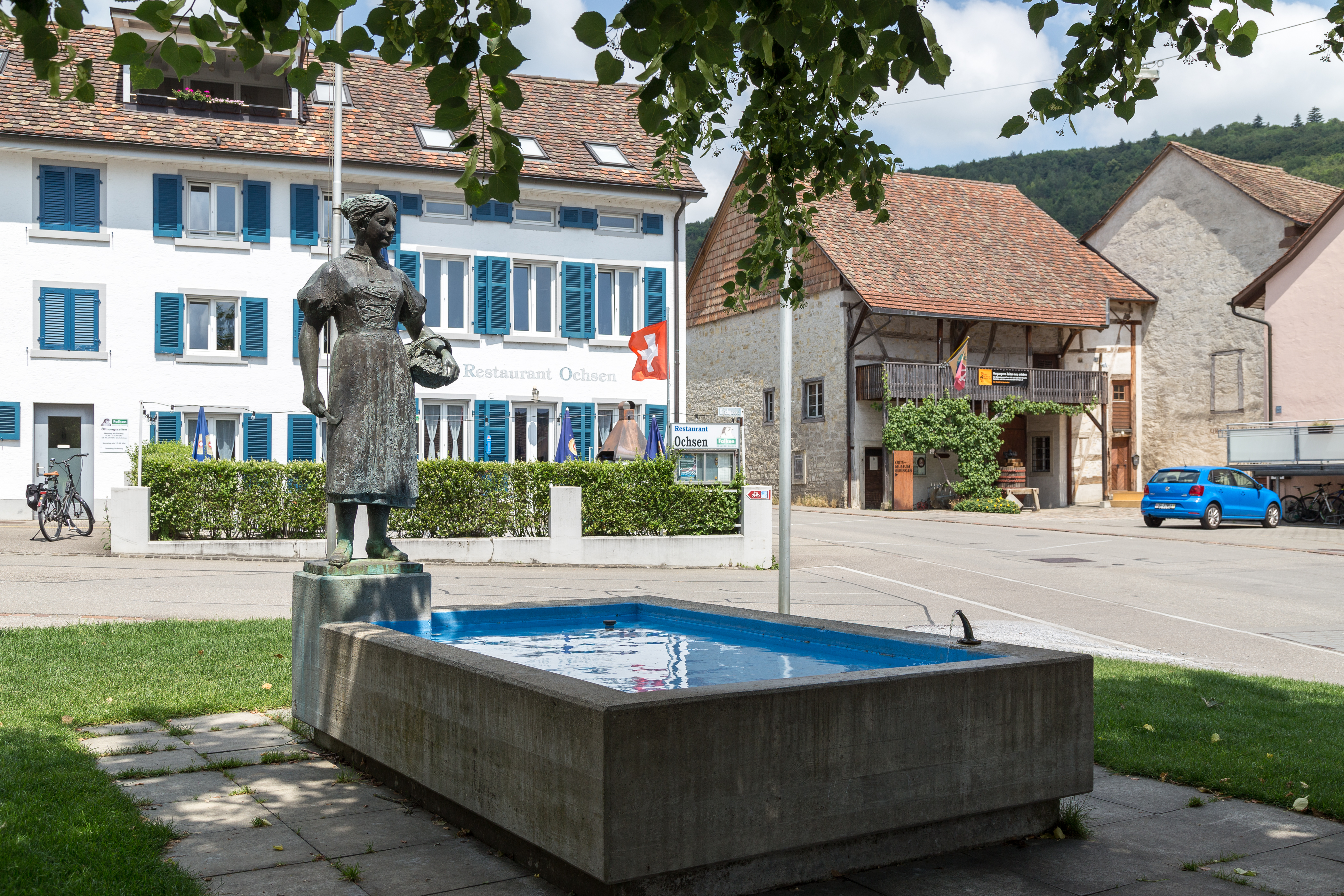 Brunnen am Brandplatz in Beringen SH, im Hintergrund das Restaurant Ochsen und das Ortsmuseum.